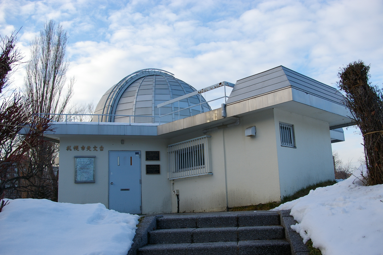 Sapporo observatory, sapporo city hokkaido.